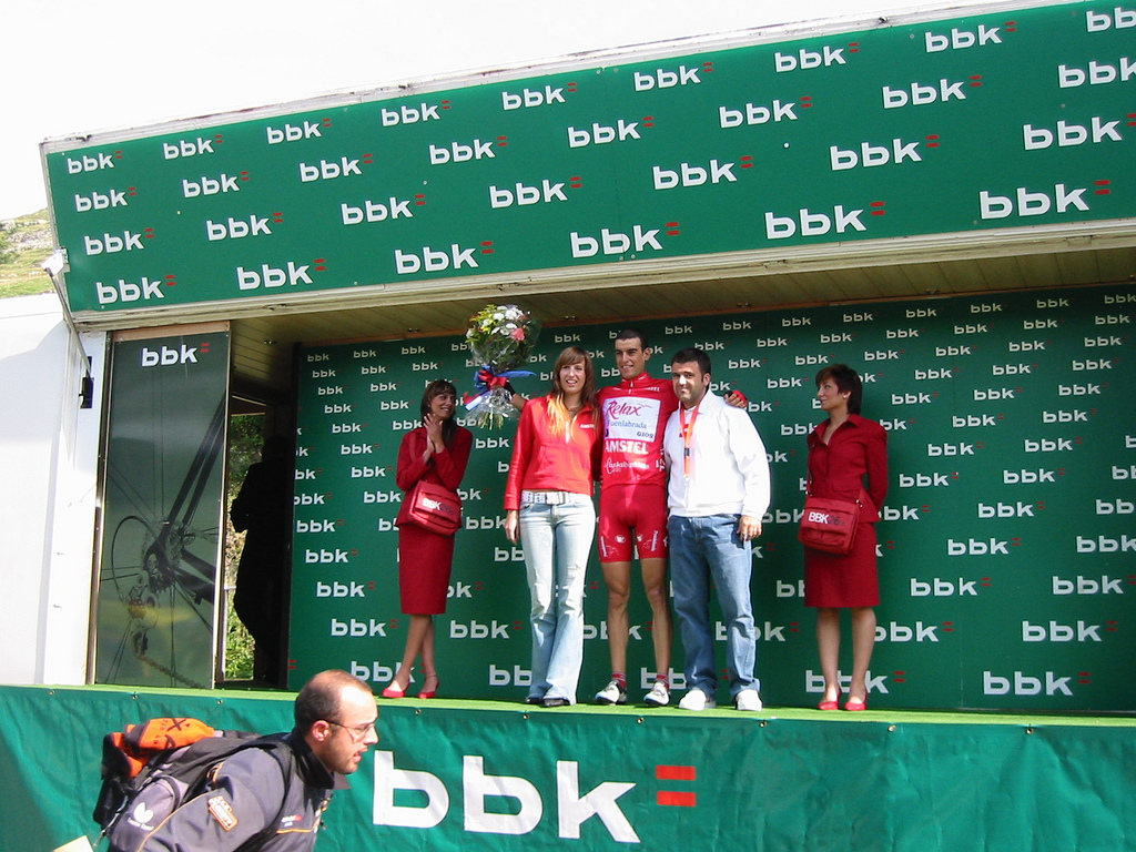 Luis Perez Romero (Relax Fuenlabrada) Lider de las Metas Volantes. - Luis PEREZ (Relax Fuenlabrada) Tarteko Helmugaren sailkapenaren liderra.